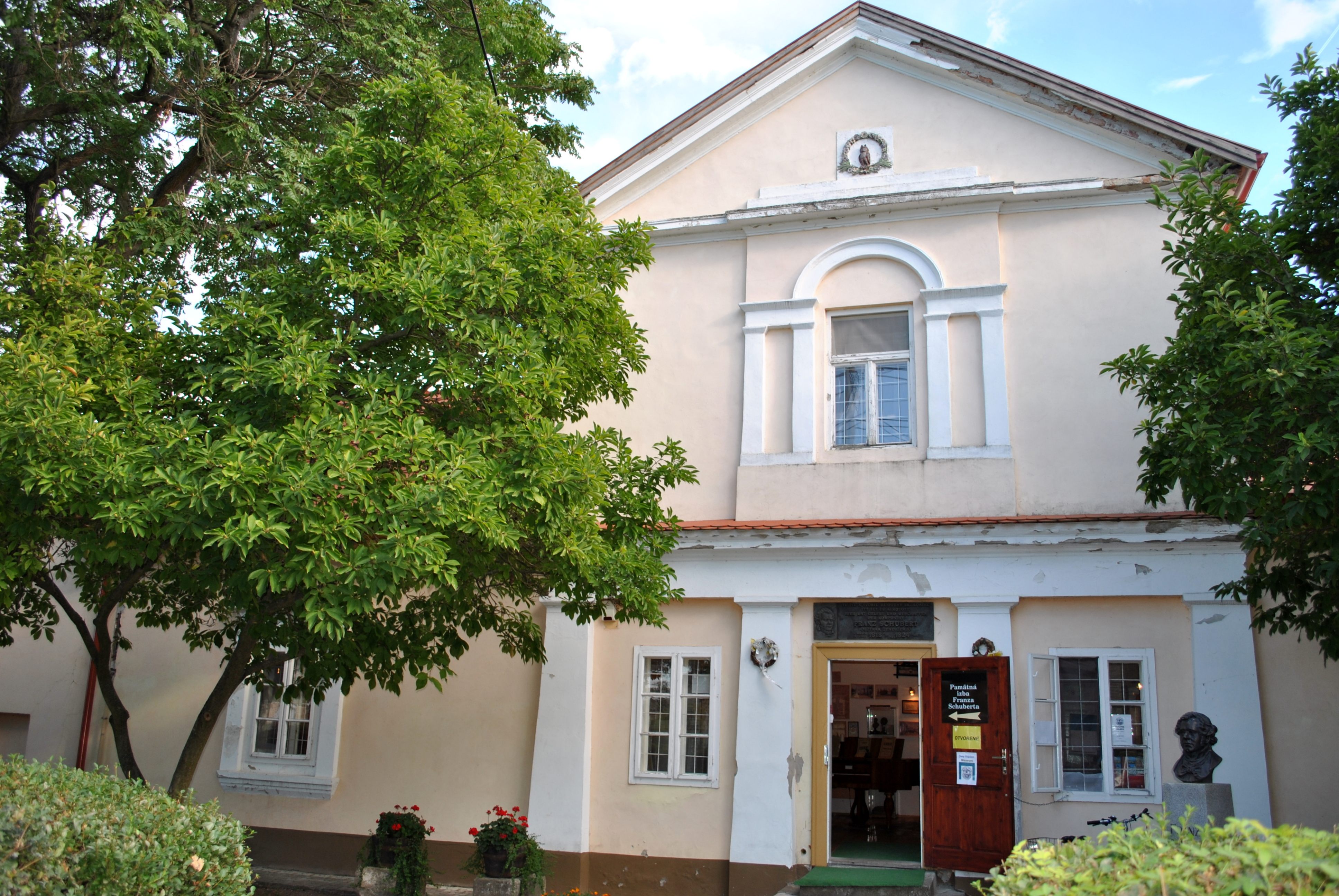 Múzeum Zselízen és Franz Schubert emlékszoba . Az ú.n. Bagolyvár.